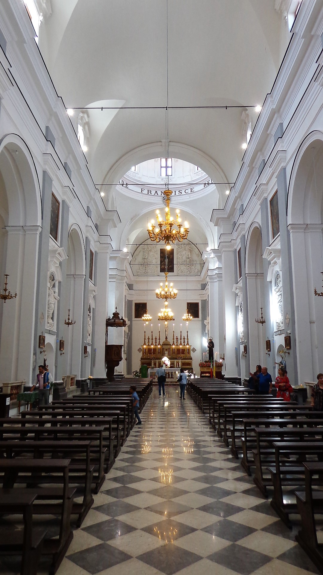 Scultura di Virtù Morale di Cristoforo Milanti